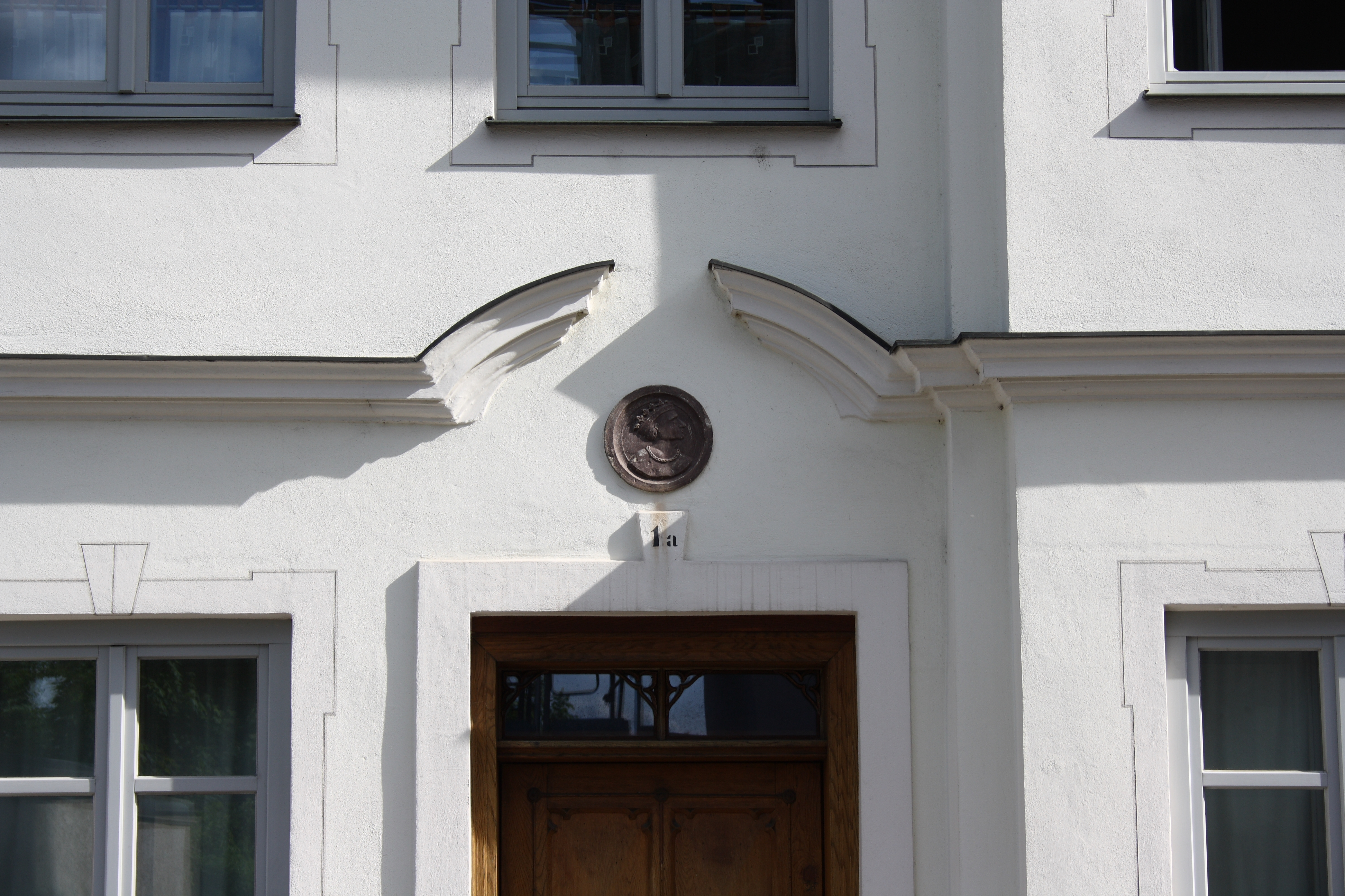 Ehemaliges Benefiziatenhaus in Lauingen im Landkreis Dillingen an der Donau (Bayern), Herzog-Georg-Straße 1a/1b